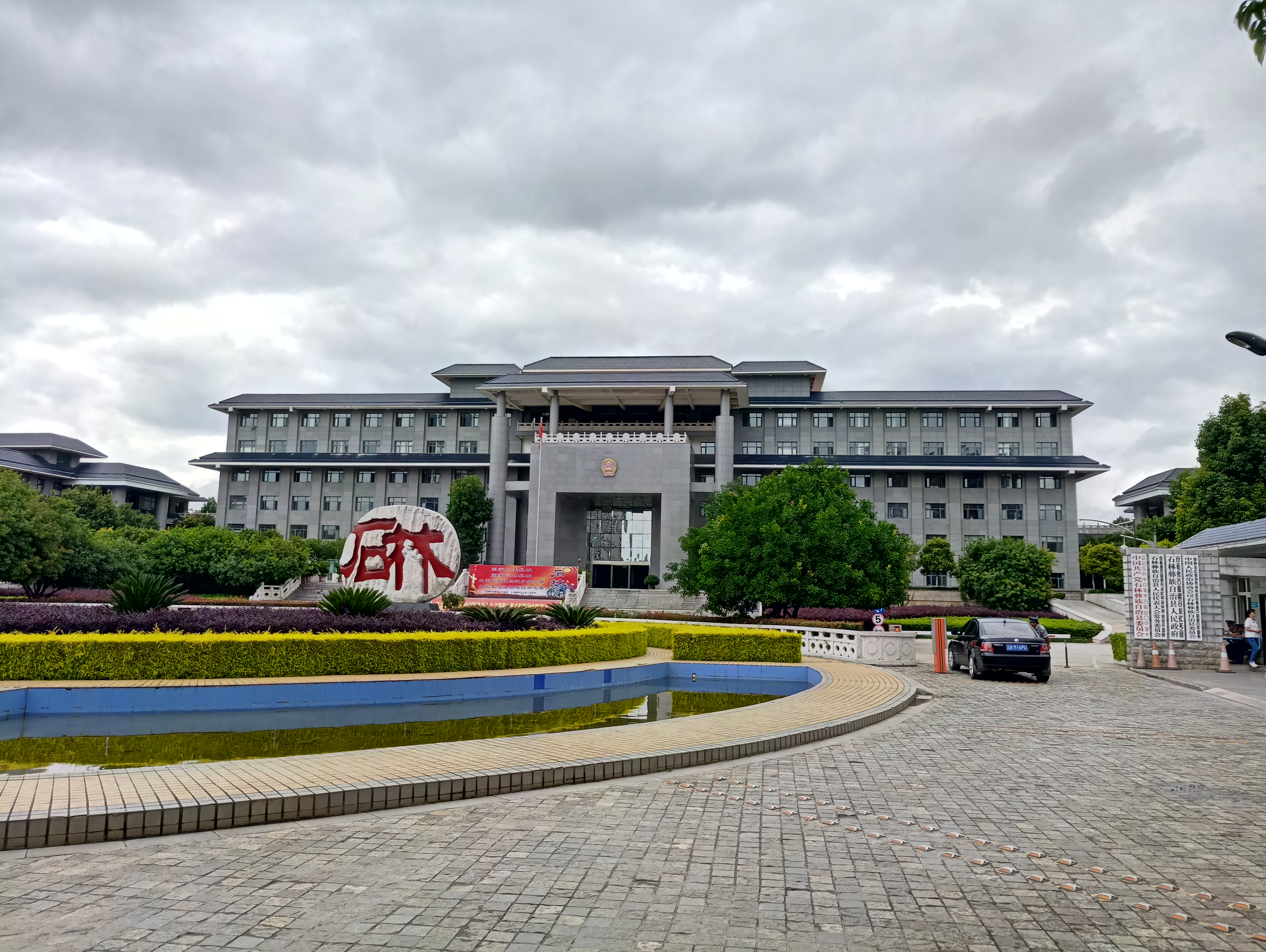 中文（中国大陆）: 石林彝族自治县行政中心